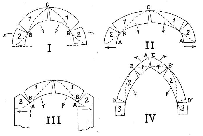 Divers modes de rupture des voûtes : voûtes en plein-cintre, en ellipse ou en anse de panier (I) – voûtes très surbaissées (II) - voûtes en arc de cercle (III) – voûtes ogivales ou surhaussées (IV)